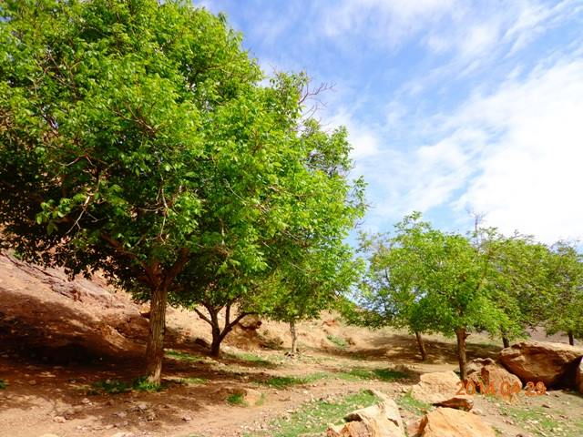 عکاس: داوود رضایی نیا